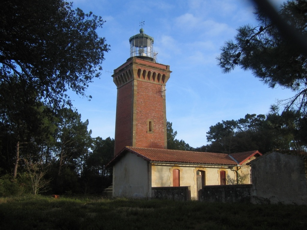 Phares sur la dune d'Hourtin